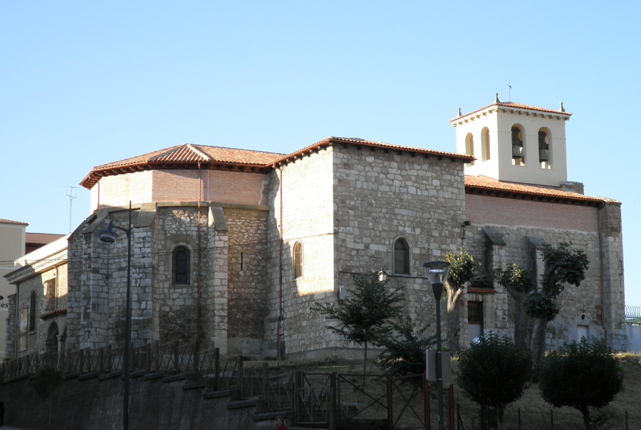 Iglesia del Colegio San Pedro y San Felices